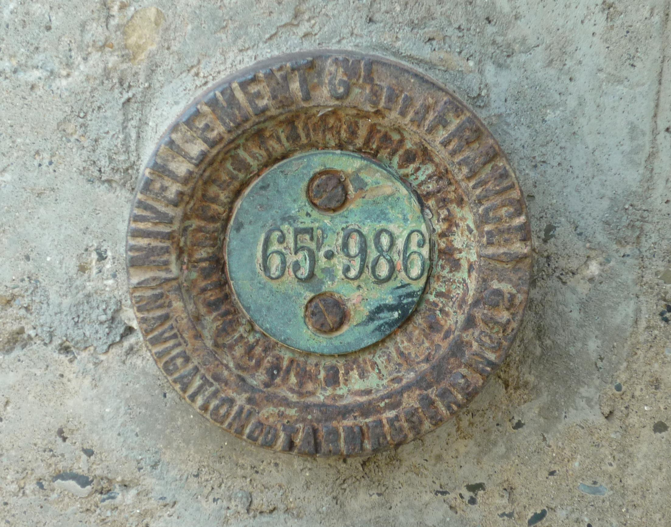 Repère de Nivellement du Réseau Bourdaoue